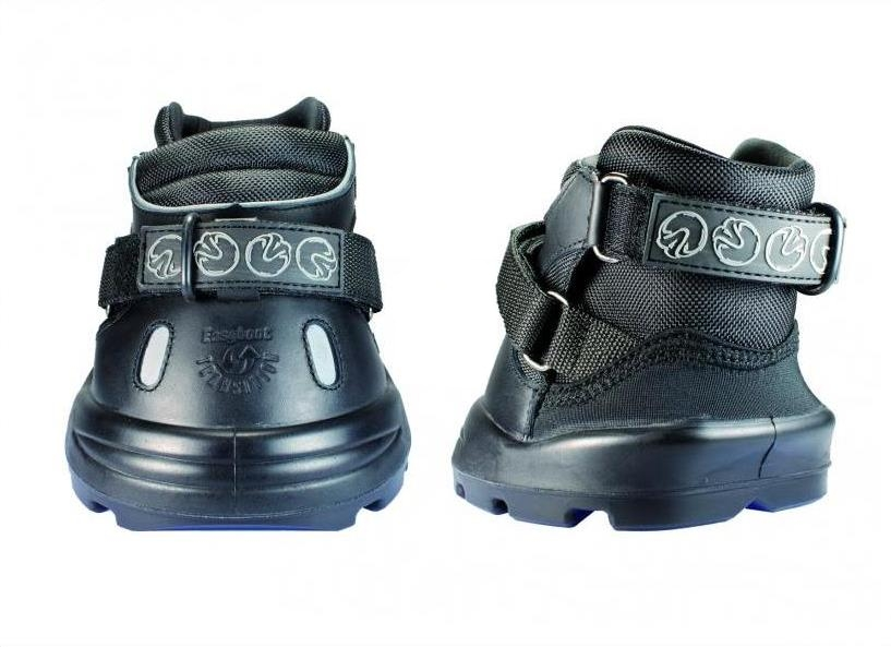 Hufschuh